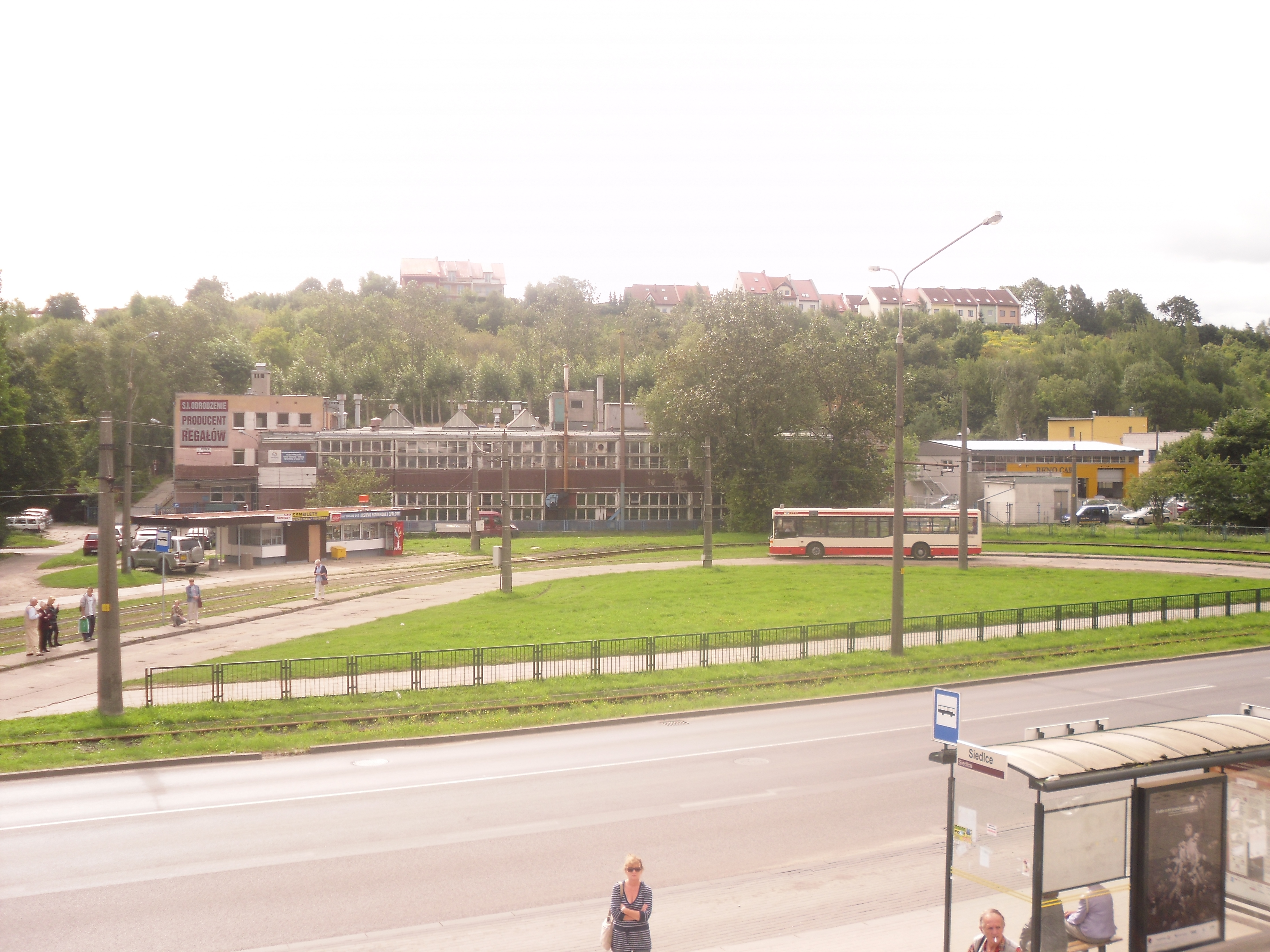 Pętla Siedlce, ul. Kartuska i budynki przy ul. Struga w Gdańsku Siedlcach.